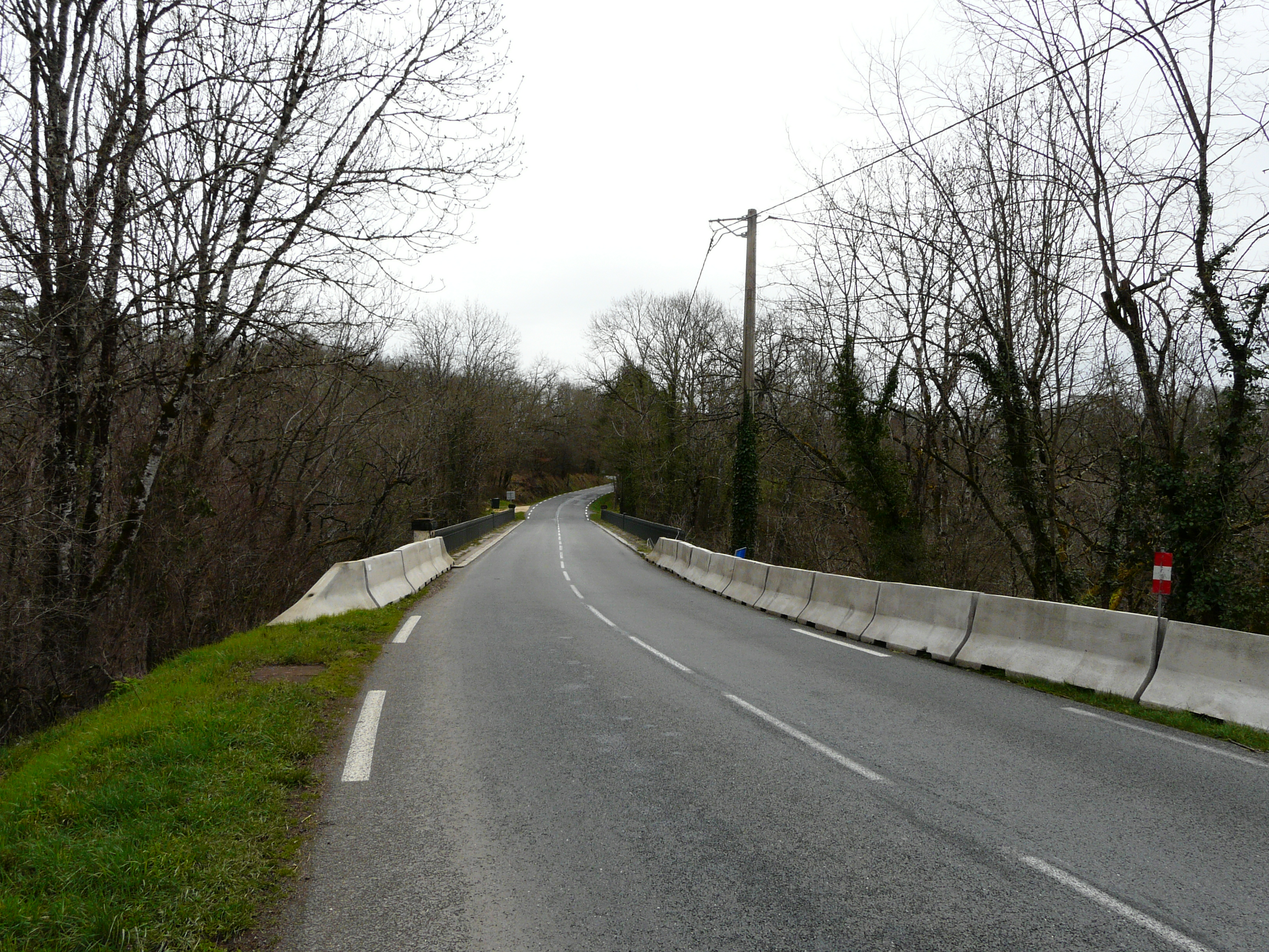 La route départementale 707 au pont des Mauroux, en limites de Nantheuil et Nanthiat, Dordogne, France.